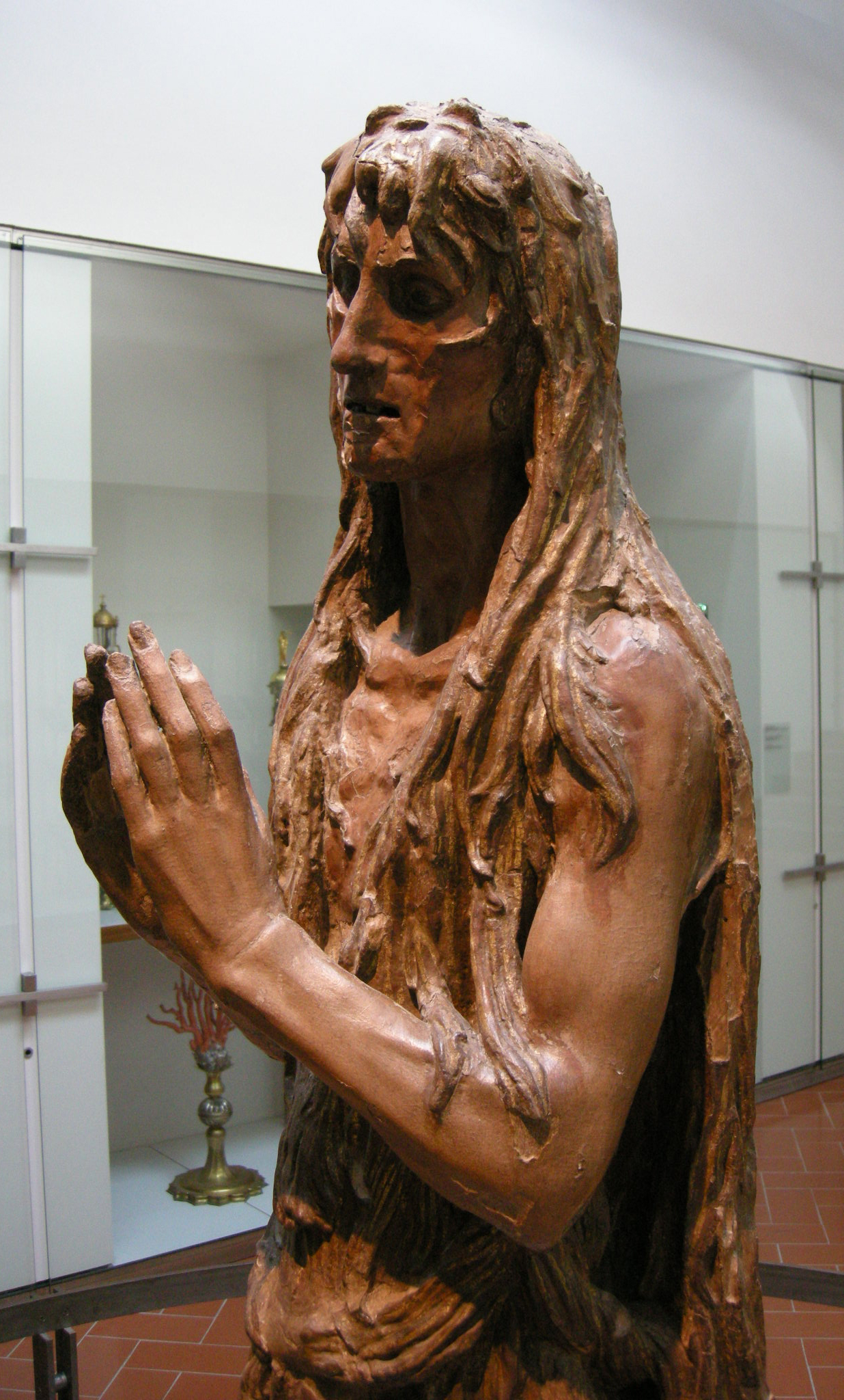 Donatello, maria maddalena